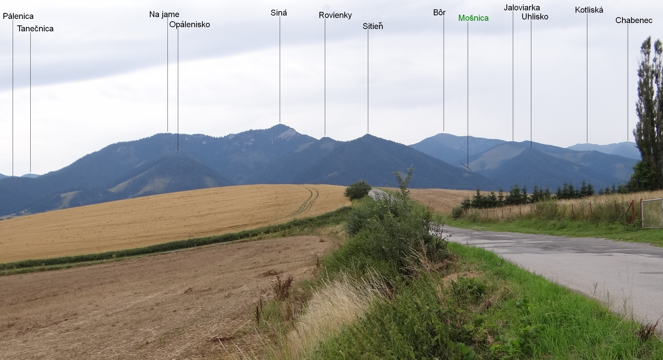 View from Svätý Kríž